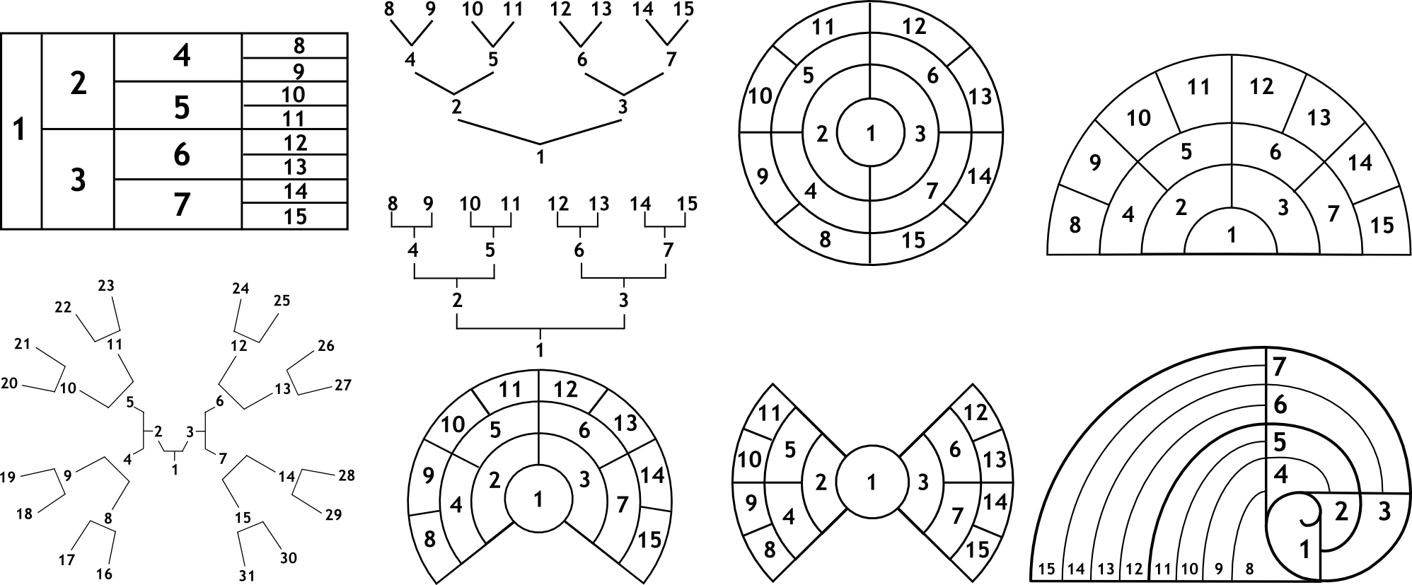 Különféle őstábla-típusok. Szegedi László, Általános genealógia. Budapest, 2015. 458. (első préselés) Various forms of pedigree charts by, László Szegedi, Általános genealógia. (Comprehensive Genealogy) Budapest, 2015. p. 458.